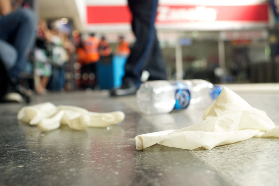 La Estación de Once (Buenos Aires), luego de la tragedia que dejó un saldo de 49 muertos y más de 600 heridos tras accidentarse una formación de la línea Sarmiento.